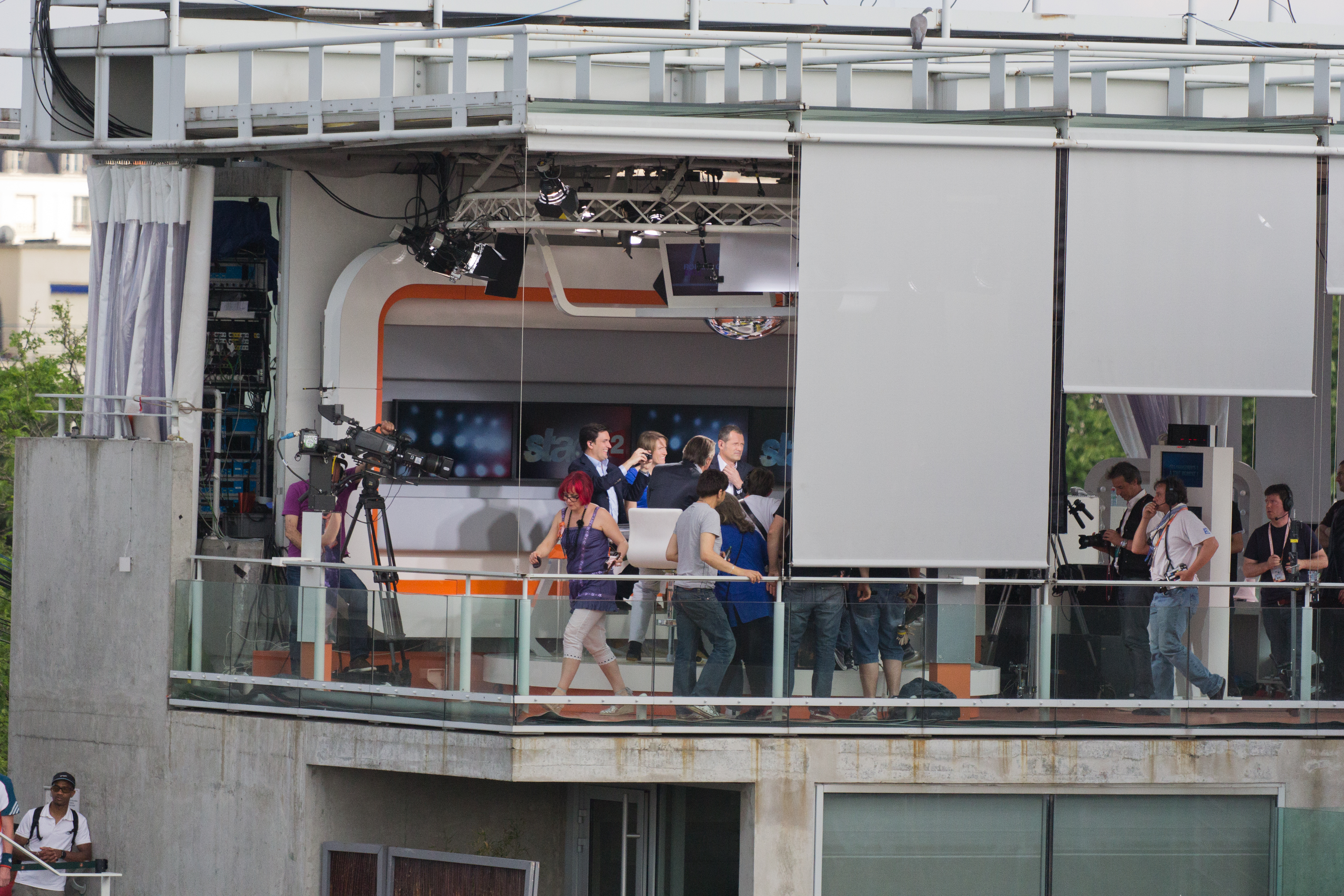 Studio de télévision du Court Philippe Chatrier, Stade de Roland Garros, Paris, France